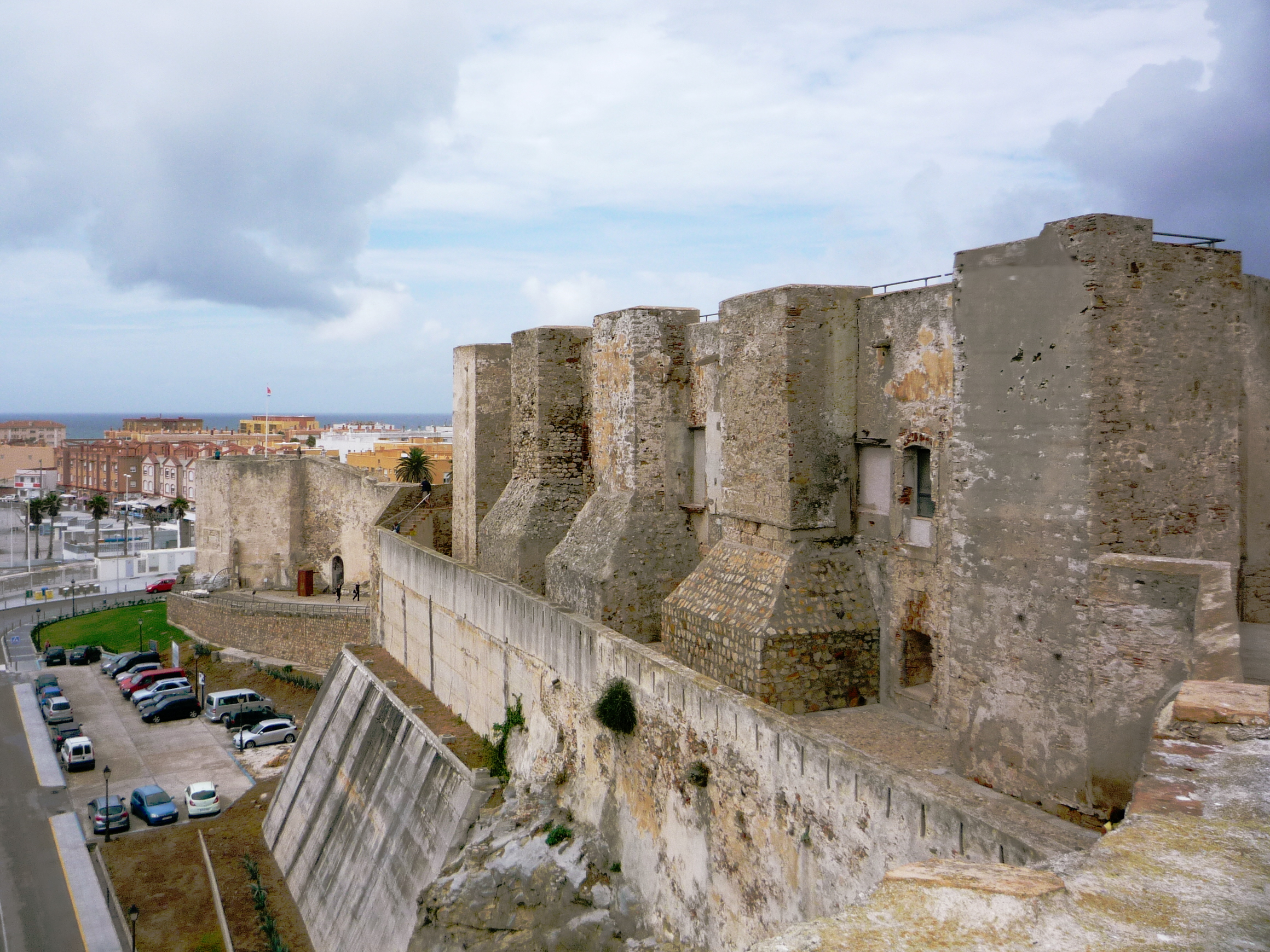 Die Burganlage vom oberen Wachturm (Mirador) aus.Im unteren Teil ist das Eingangstor gut zu sehen. See more about in a related article (DE) of my travelblog.